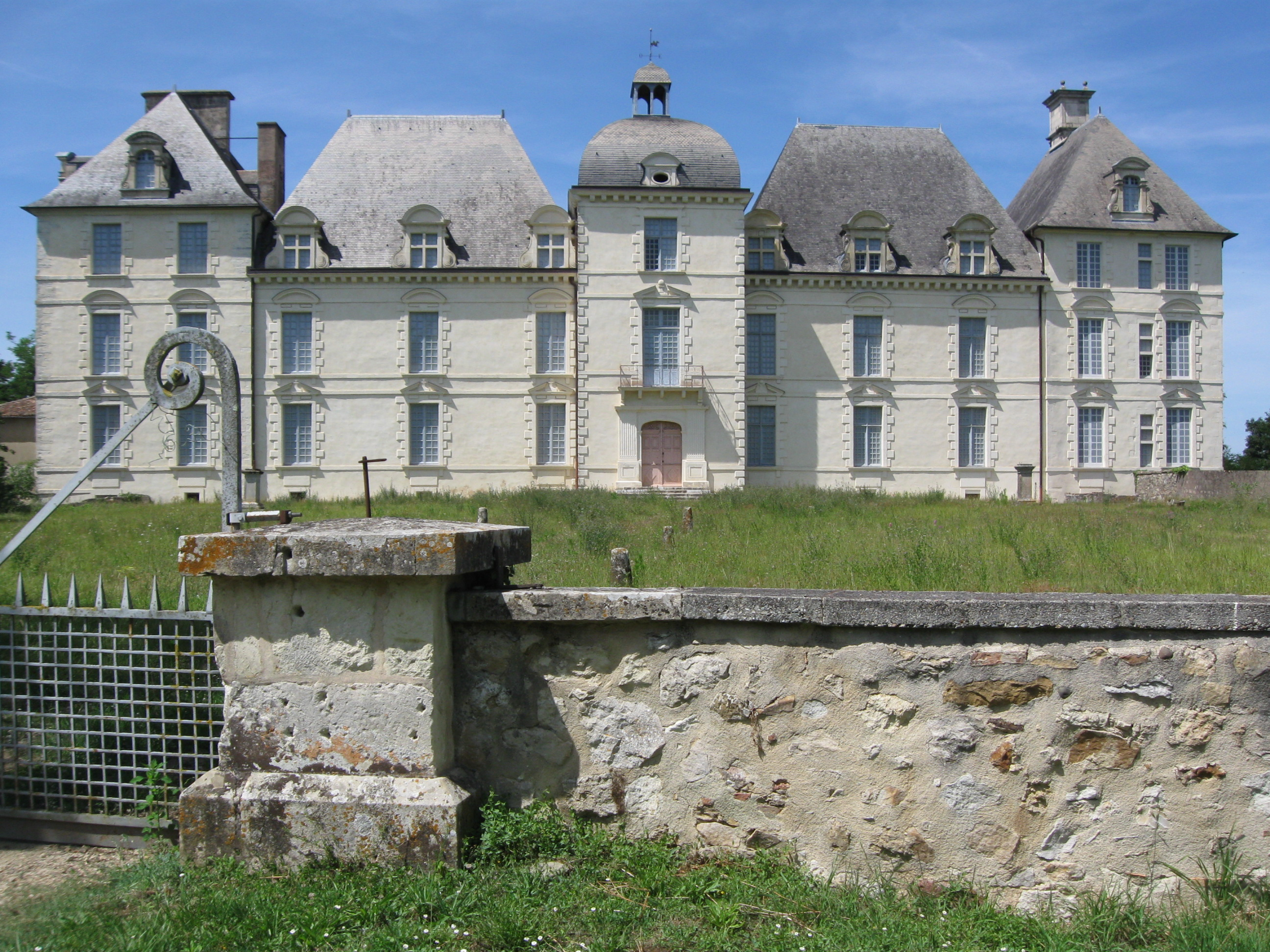 Façade Sud